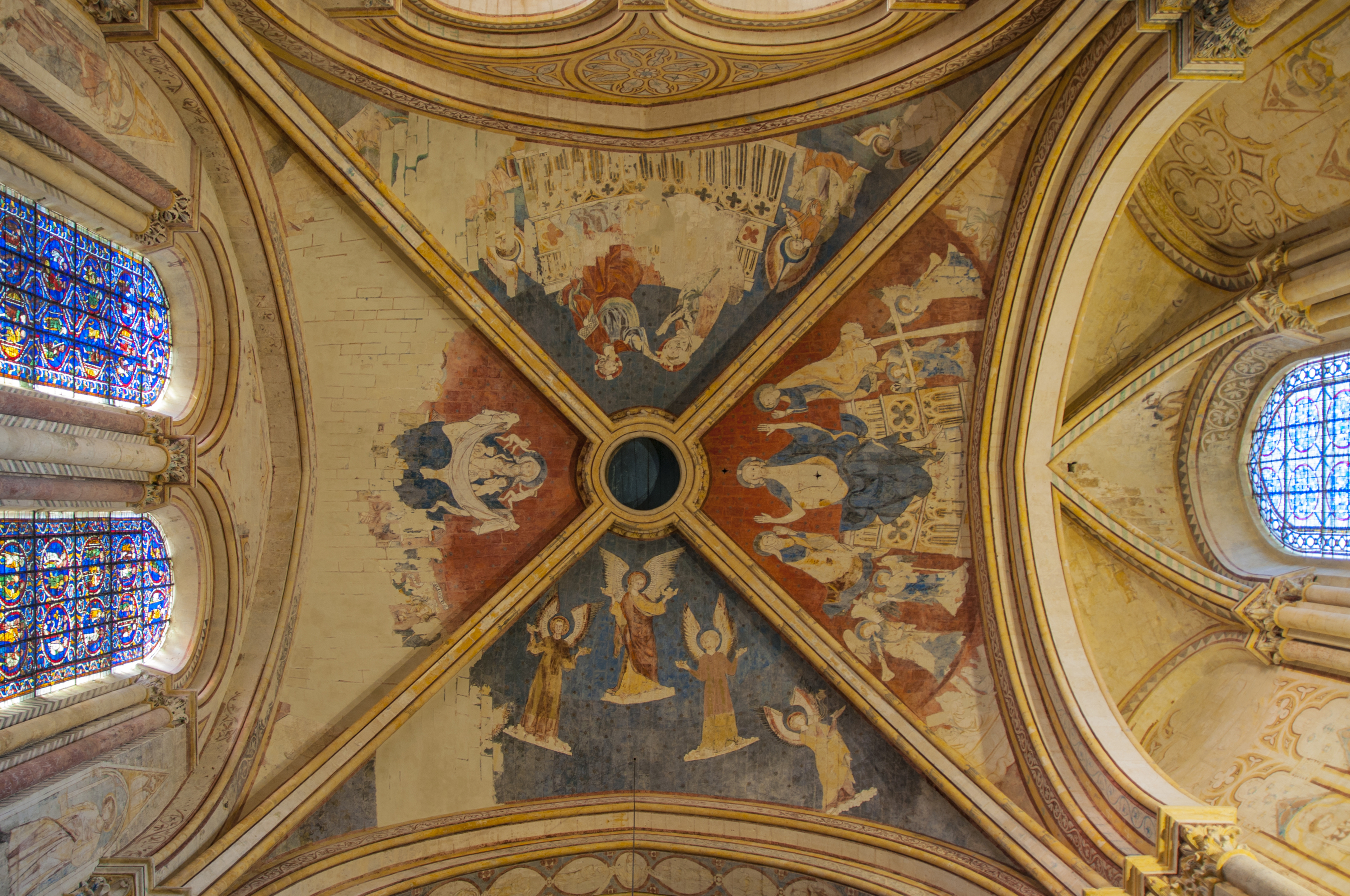 Vue sur les peintures murales réalisées vers la fin du XIIIe siècle